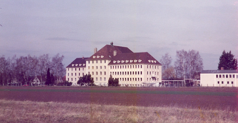 Weißenhorn_Bayern,_Claretinerkolleg_im_Jahr_1983